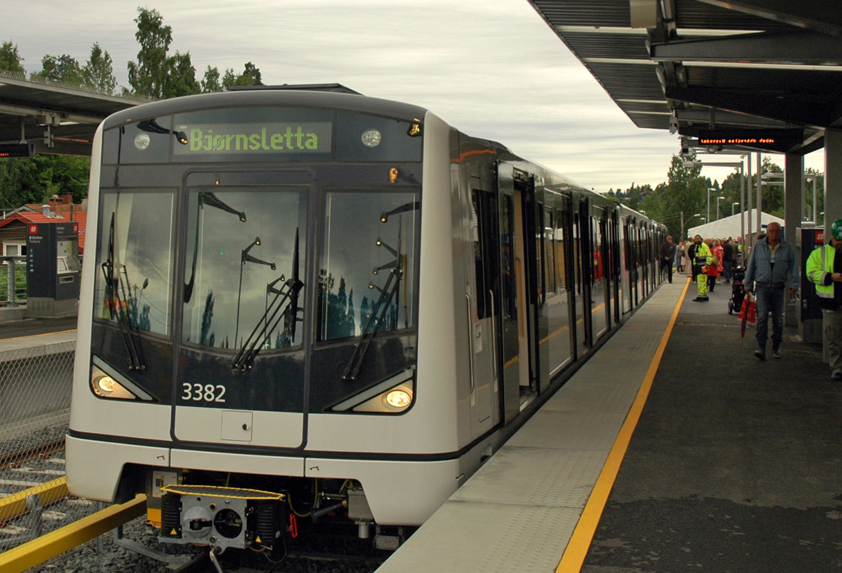 Foto fra åpningen, rett før stasjonen åpner for ordinær drift.